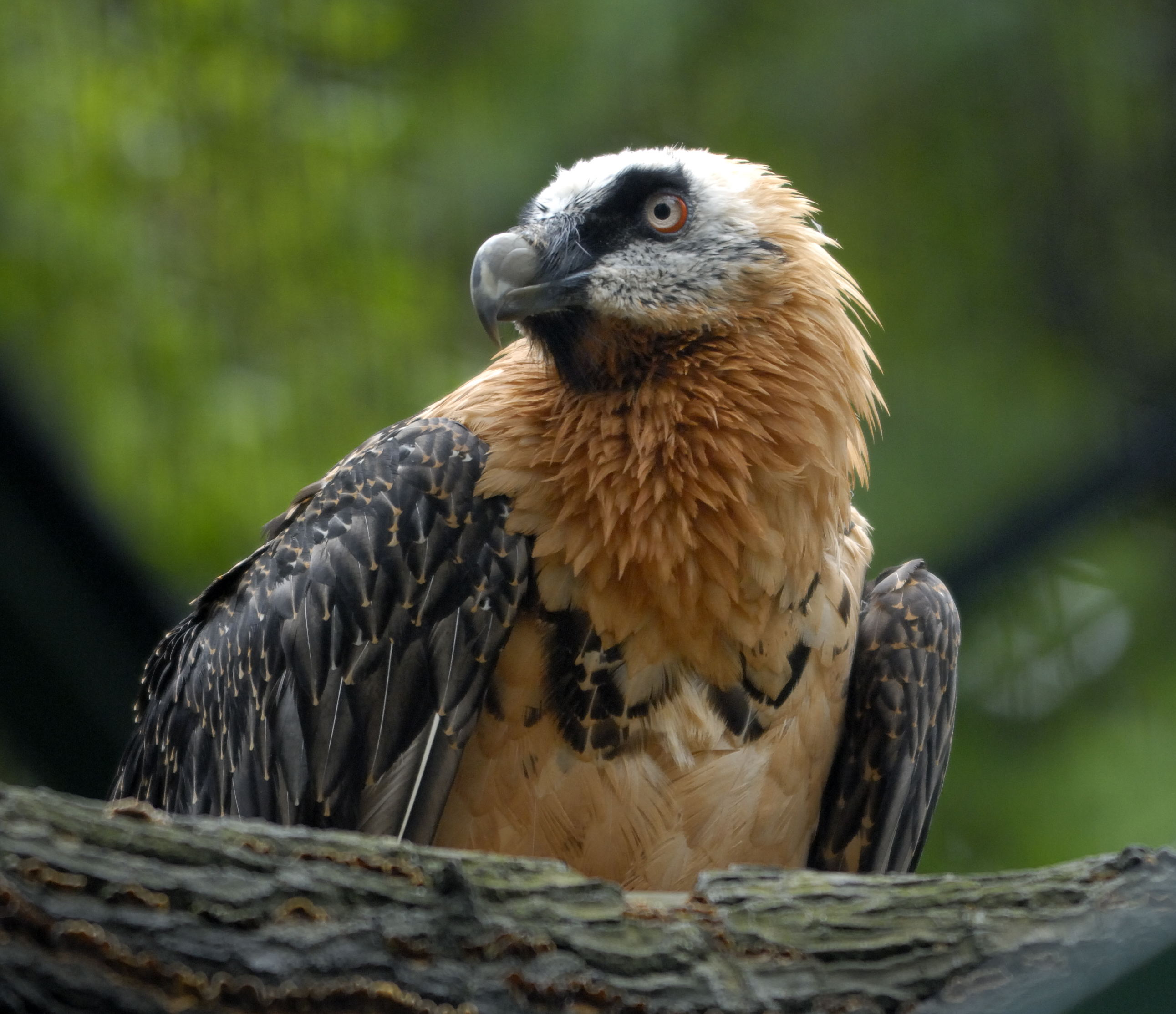 Bartgeier (Gypaetus_barbatus) im Tiergarten Schönbrunn, Wien, Österreich.